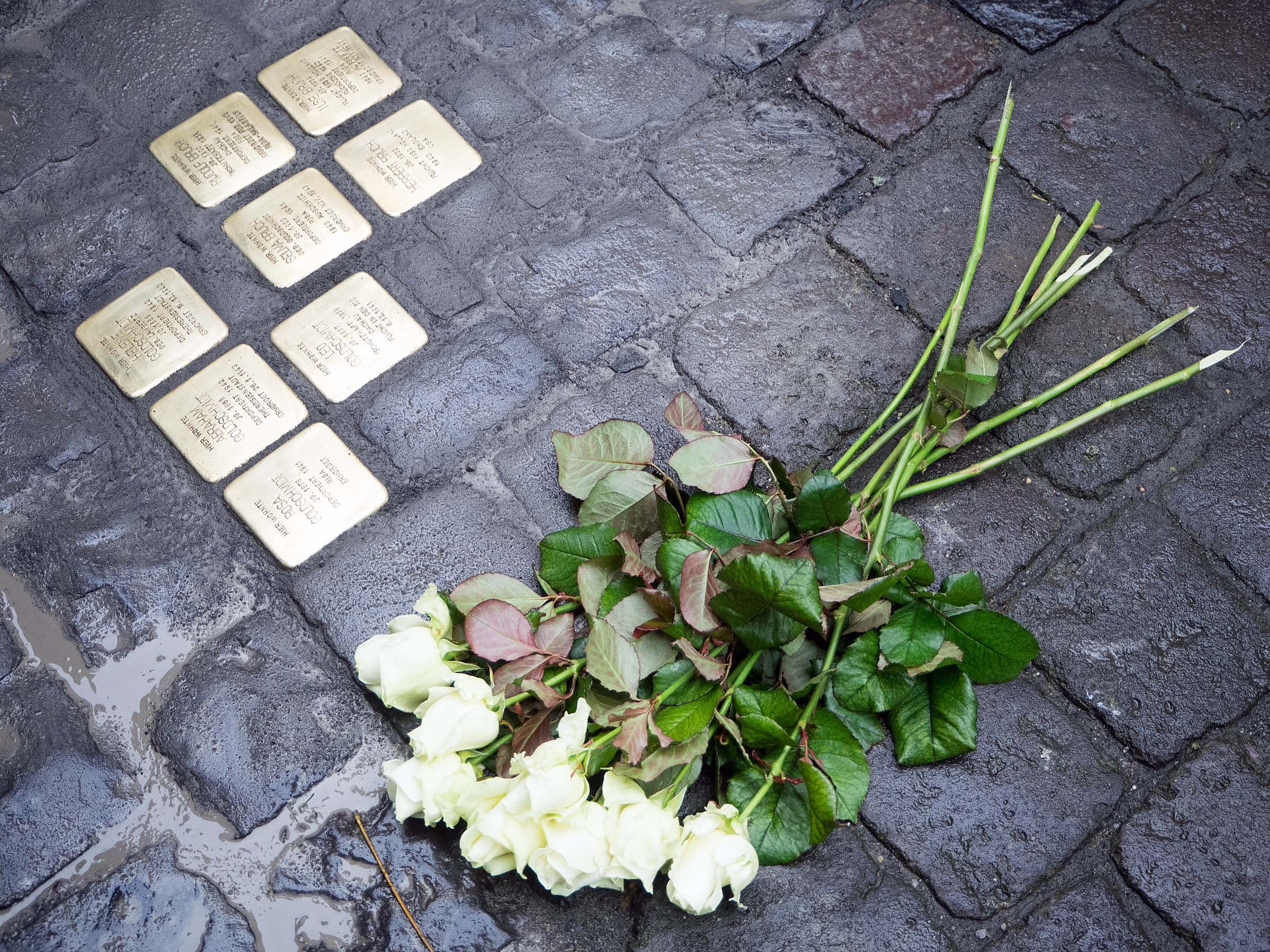 Symbolbild: Stolpersteine in Kempen mit Blumen (Verlegung am 18.12.2017, Alte Schulstr. 10)